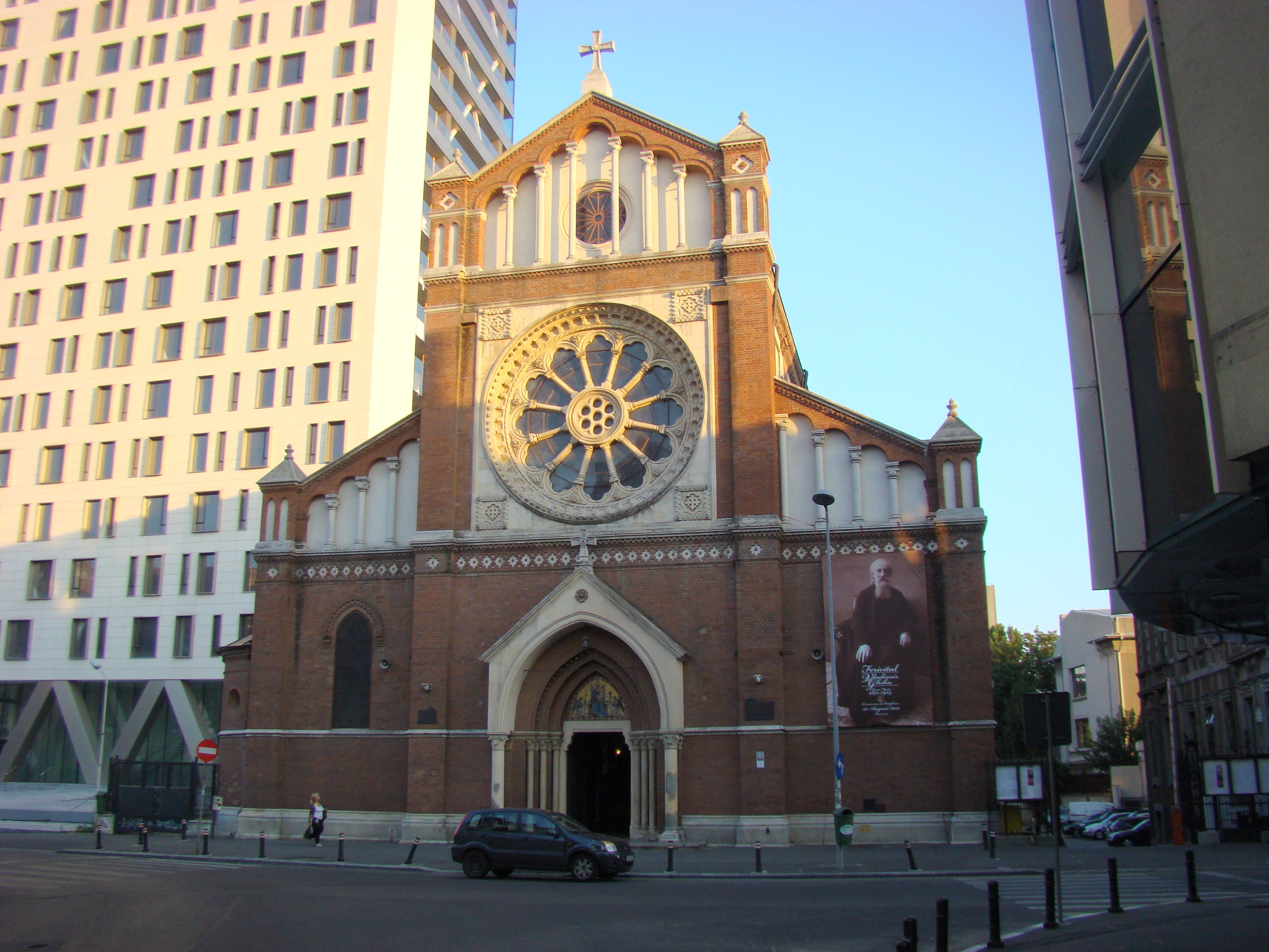 Catedrala romano-catolică „Sf. Iosif“